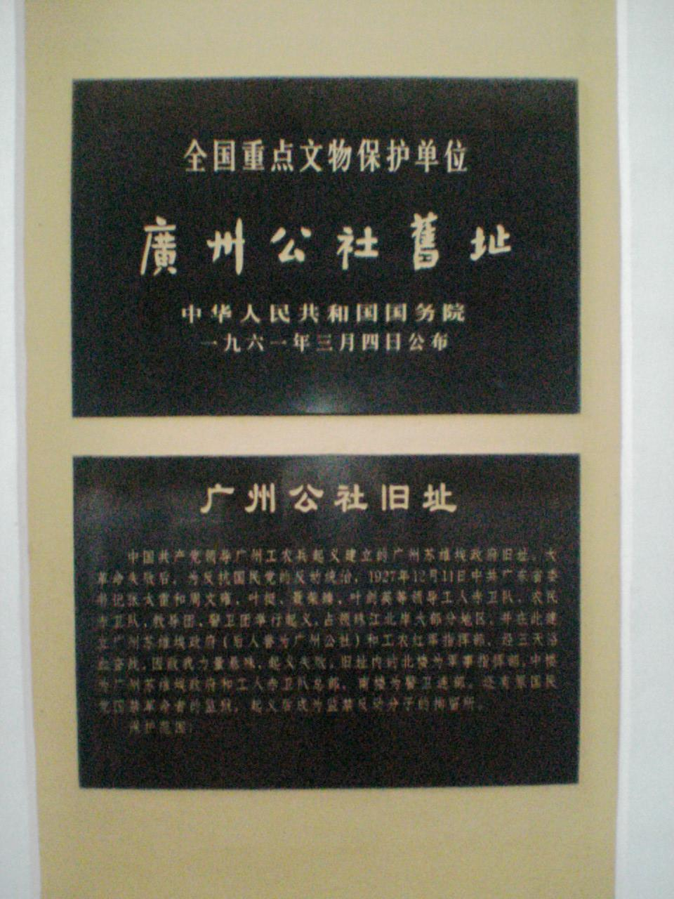 广州起义纪念馆的文物牌